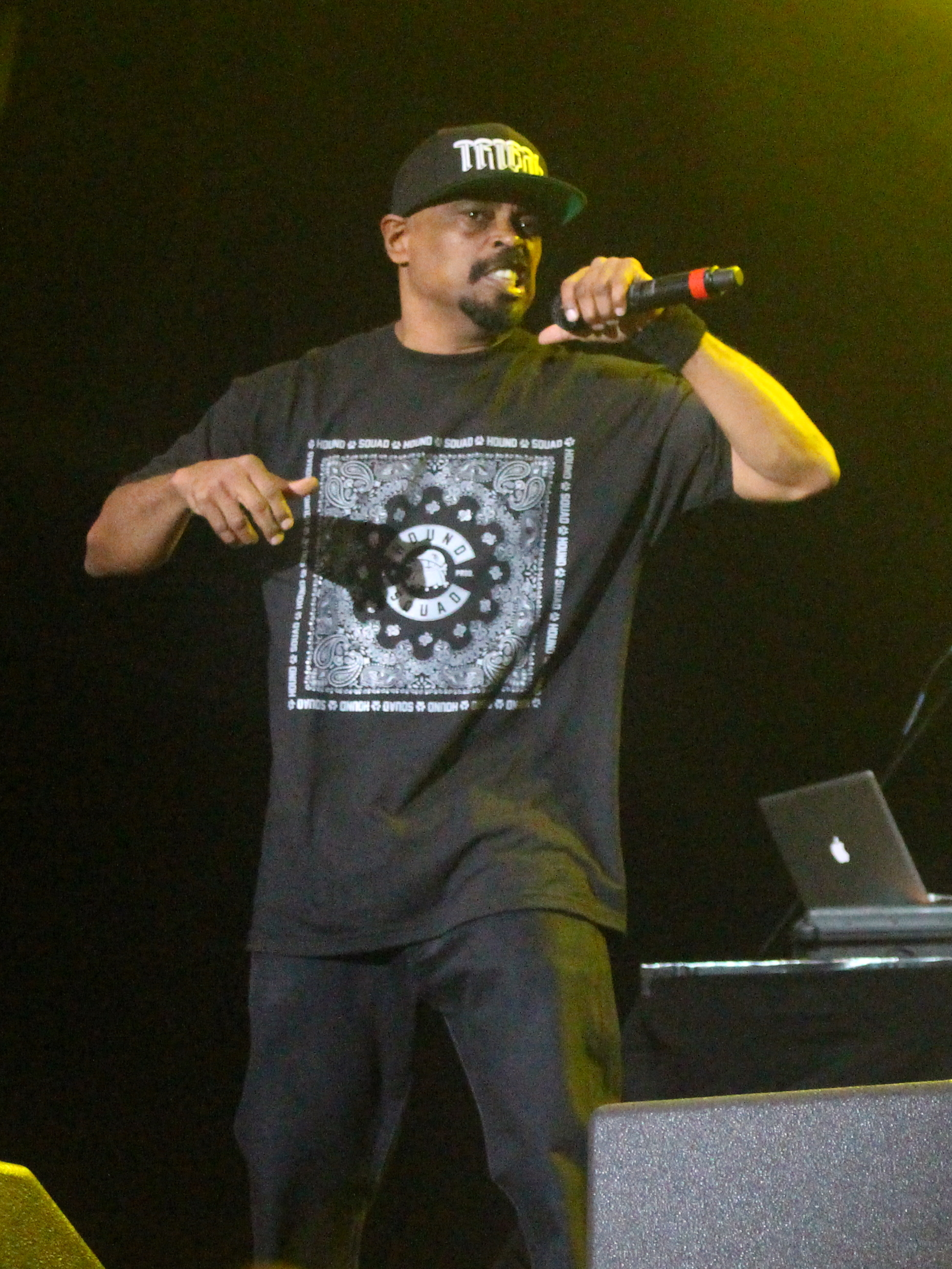 Festivalsommer This photo was created with the support of donations to Wikimedia Deutschland in the context of the CPB project "Festival Summer".